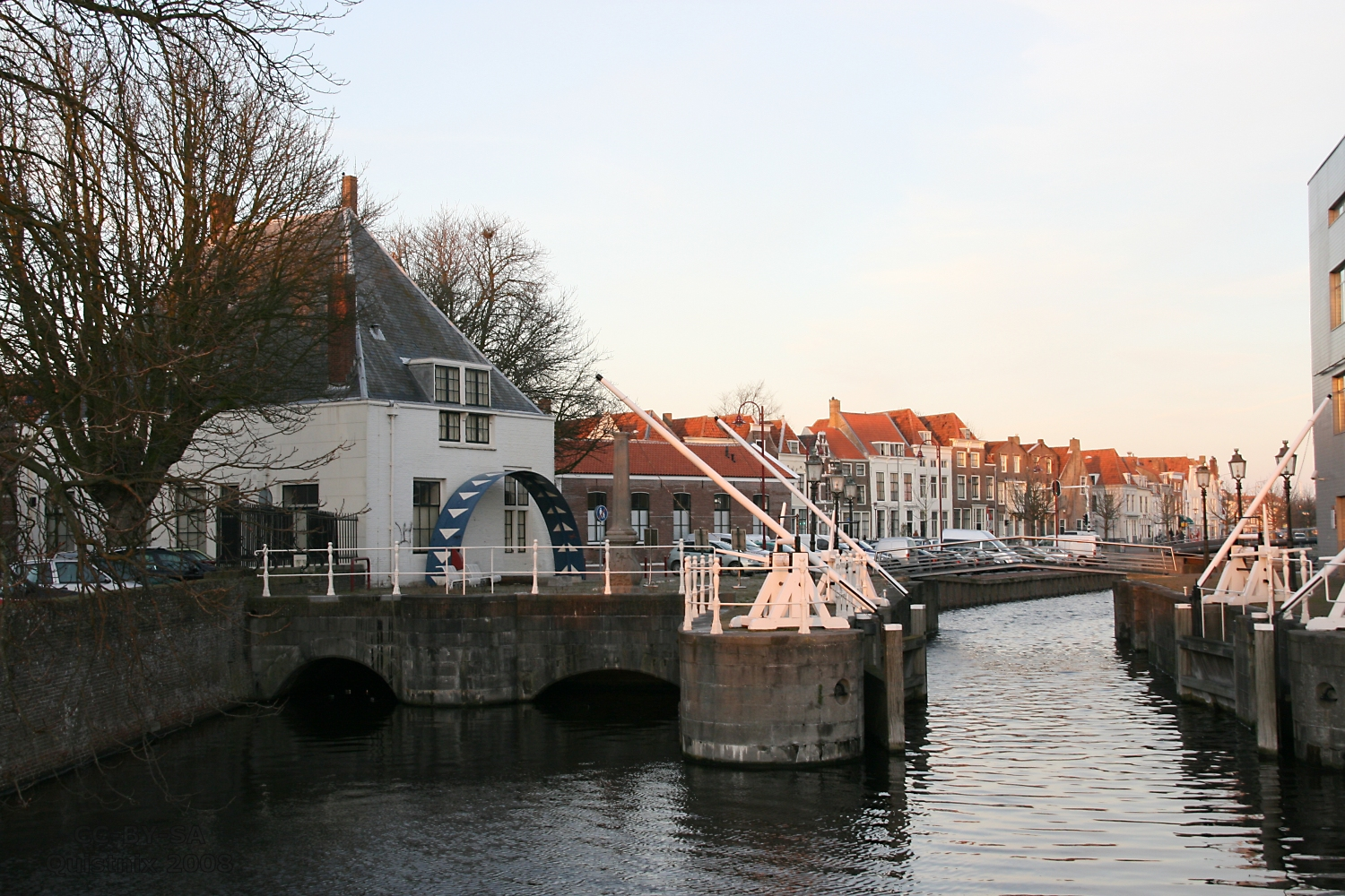 Middelburg: voormalige getijdemolen met sluis